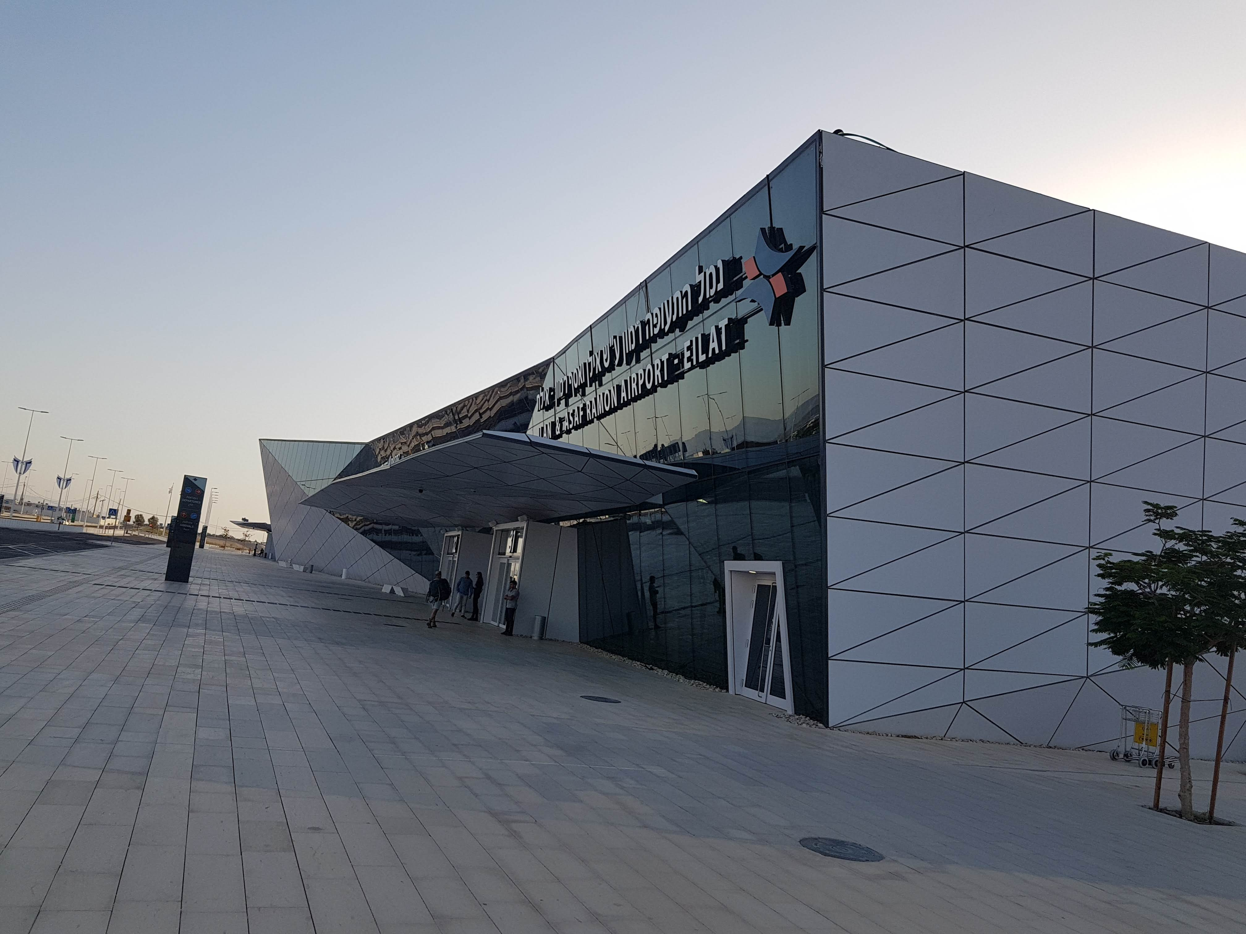 הטרמינל של נמל התעופה רמון מכיוון הנוסעים היוצאים